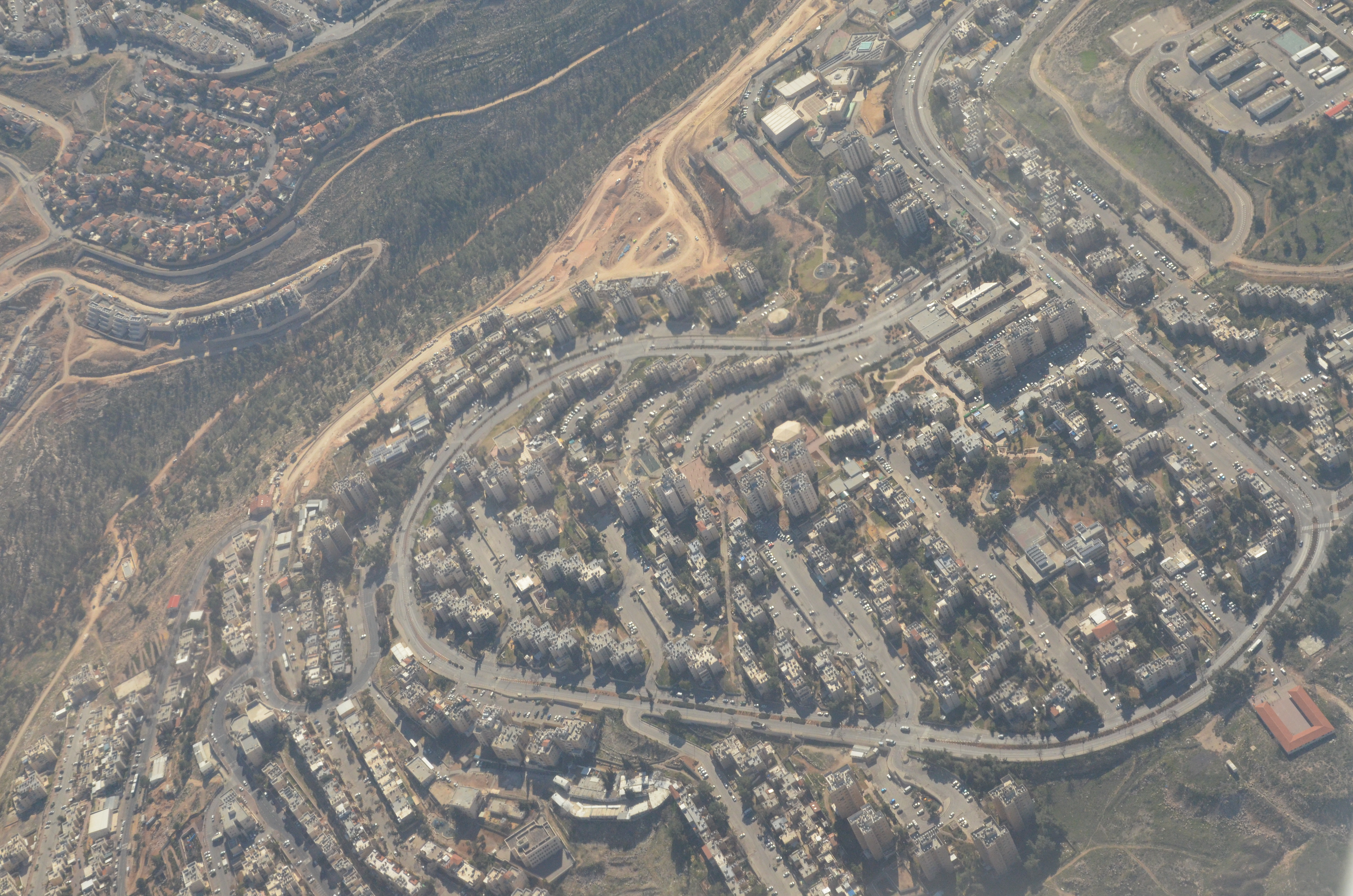 נוה יעקב